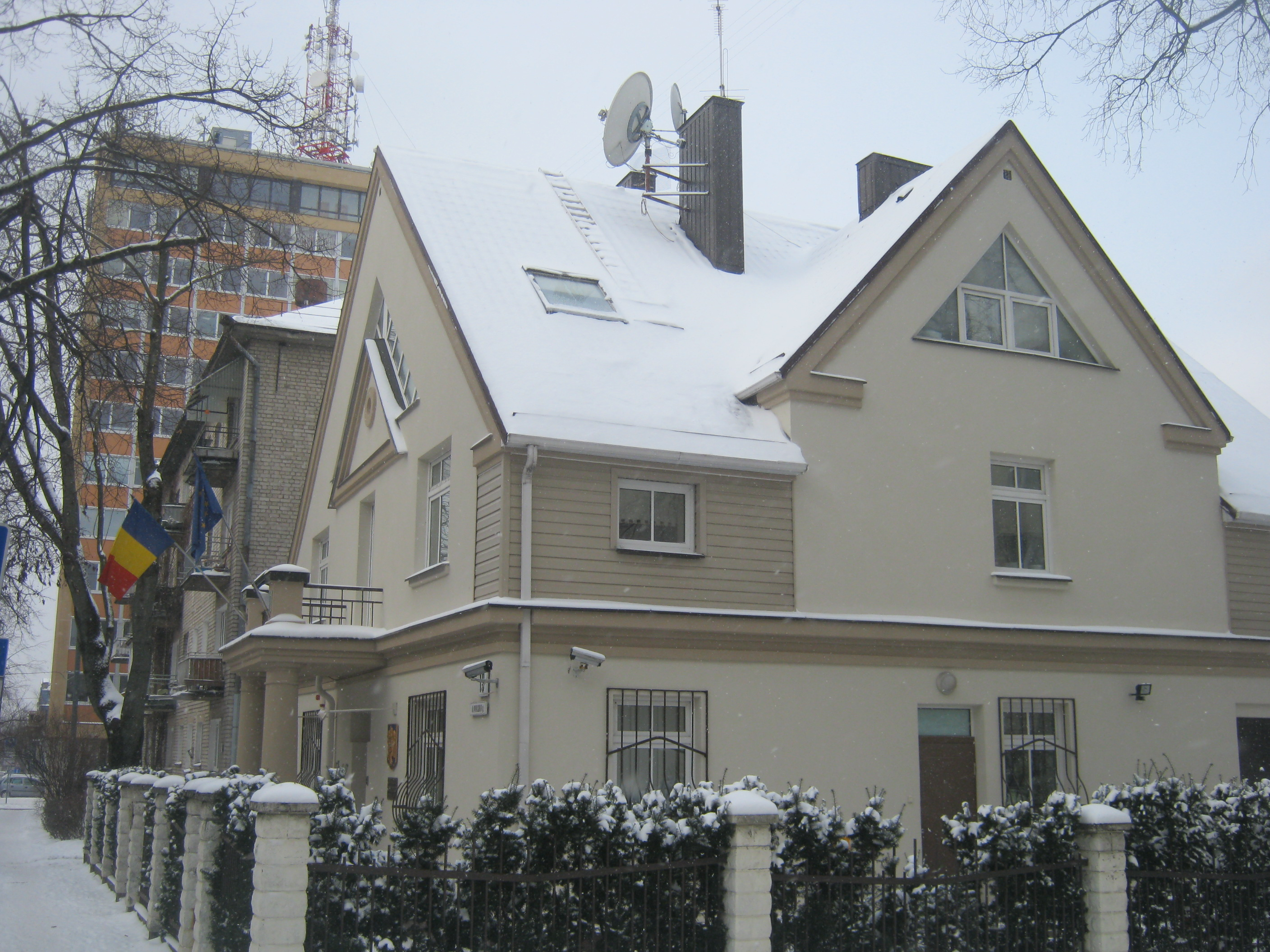 Rumunijos ambasada, Naujamiestis, Vilnius